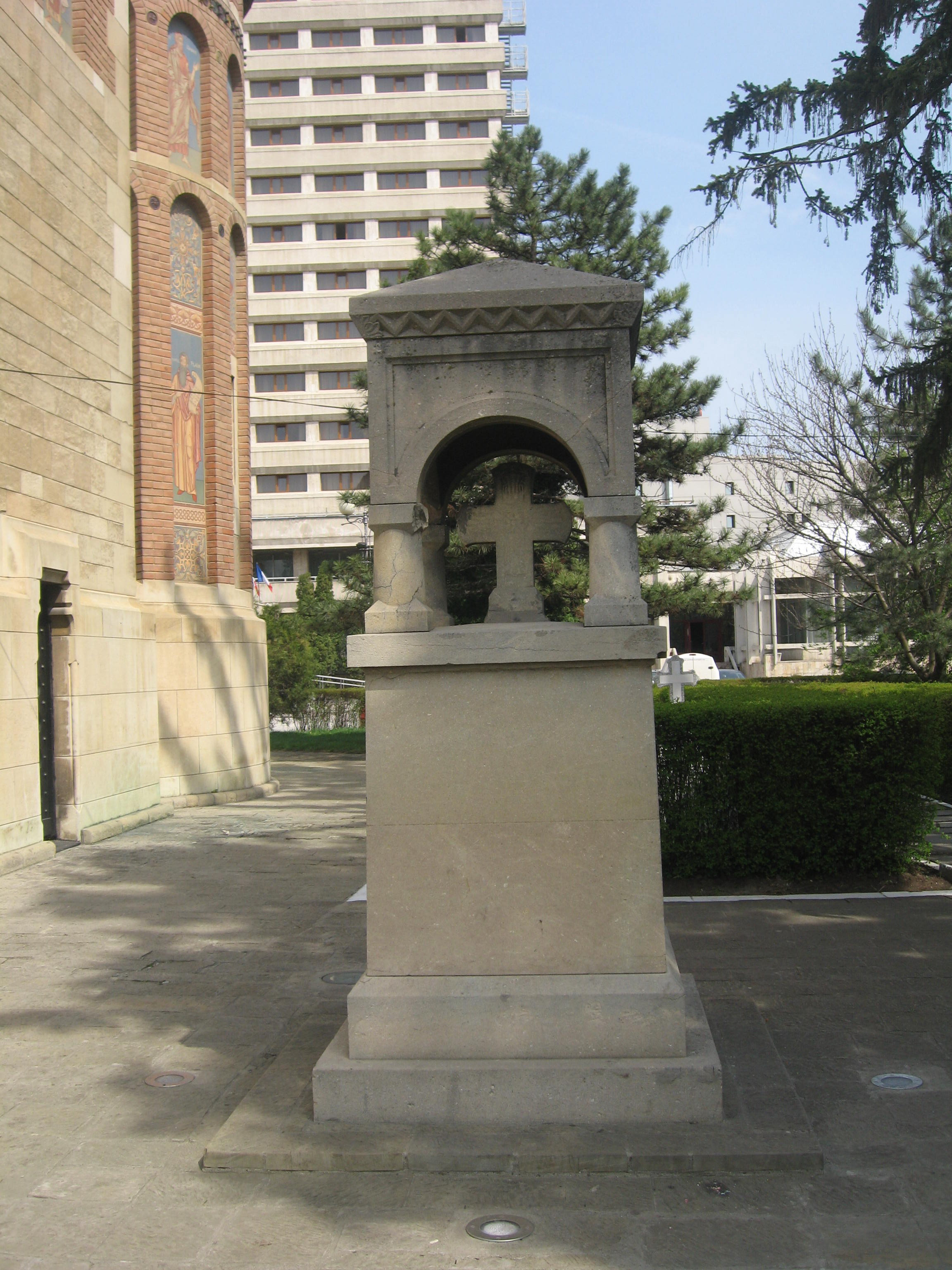 Biserica Sf. Nicolae Domnesc din Iași